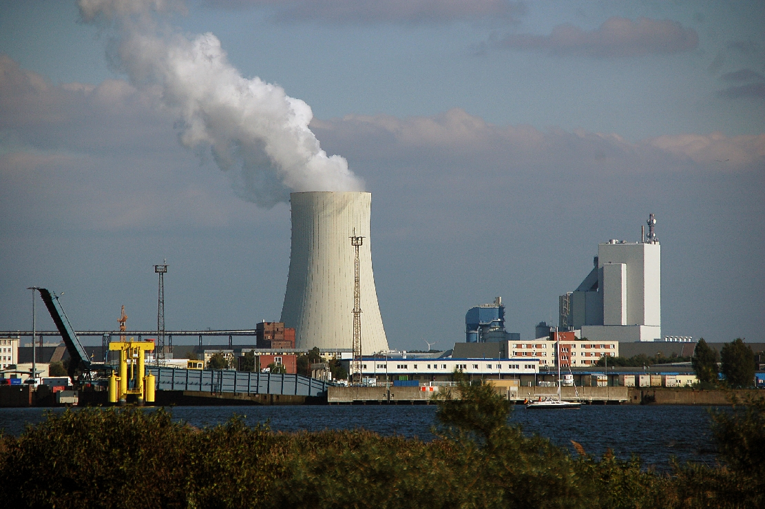 Überseehafen Rostock und Steinkohlekraftwerk